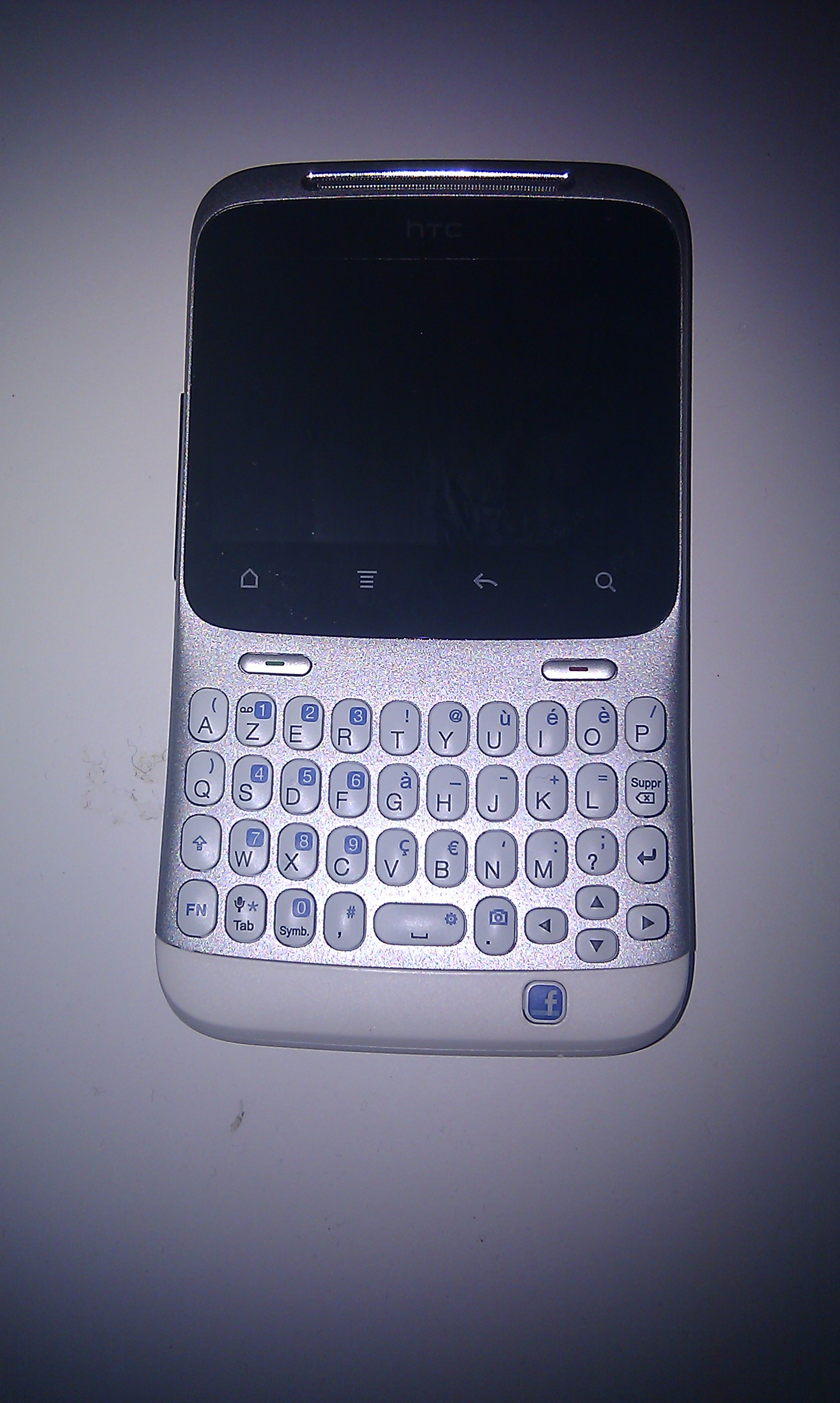 Téléphone HTC Chacha Vue générale